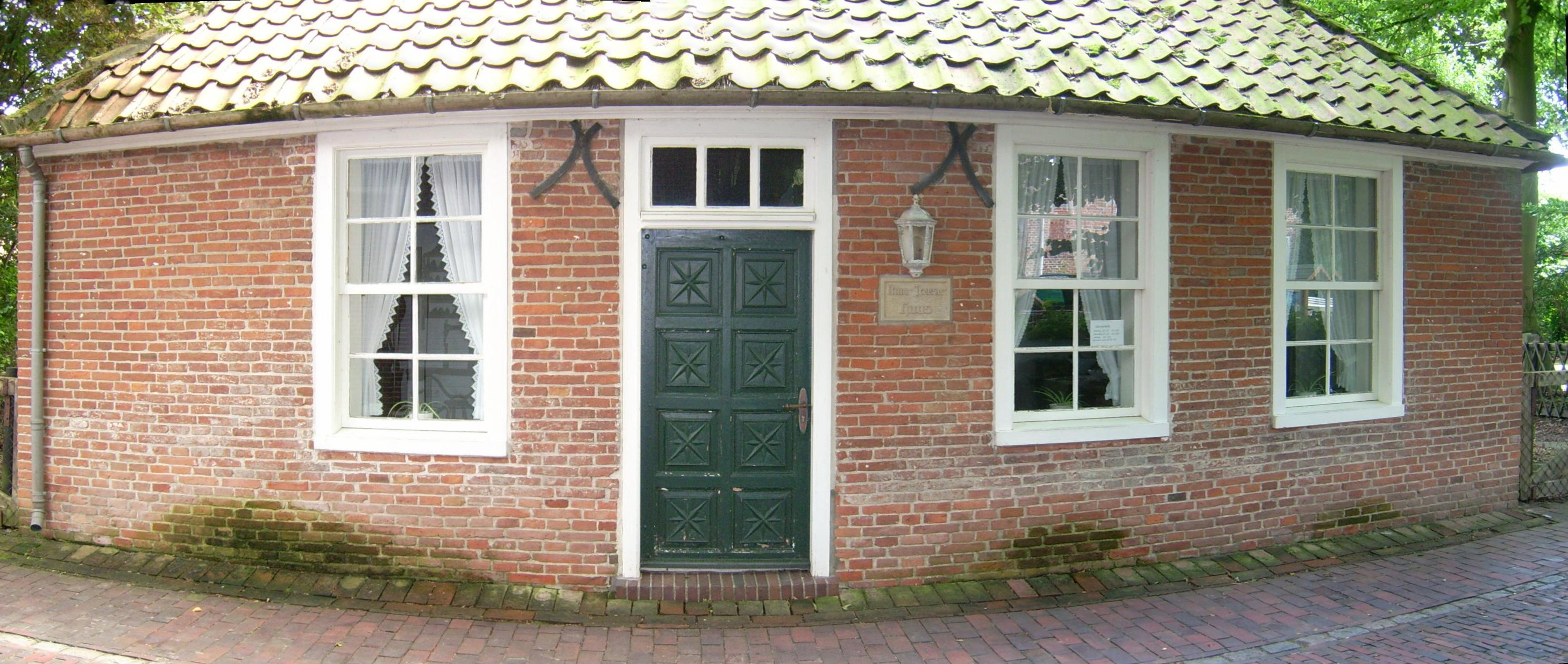 Oma-Freese-Huus in Dornum